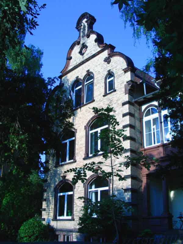 Corpshaus der Agronomia in Göttingen